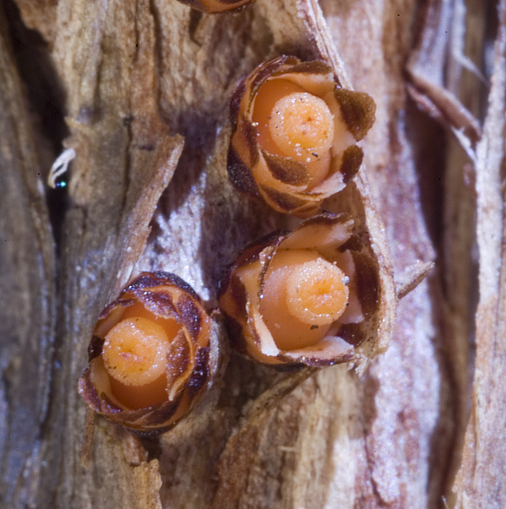 KRT3198